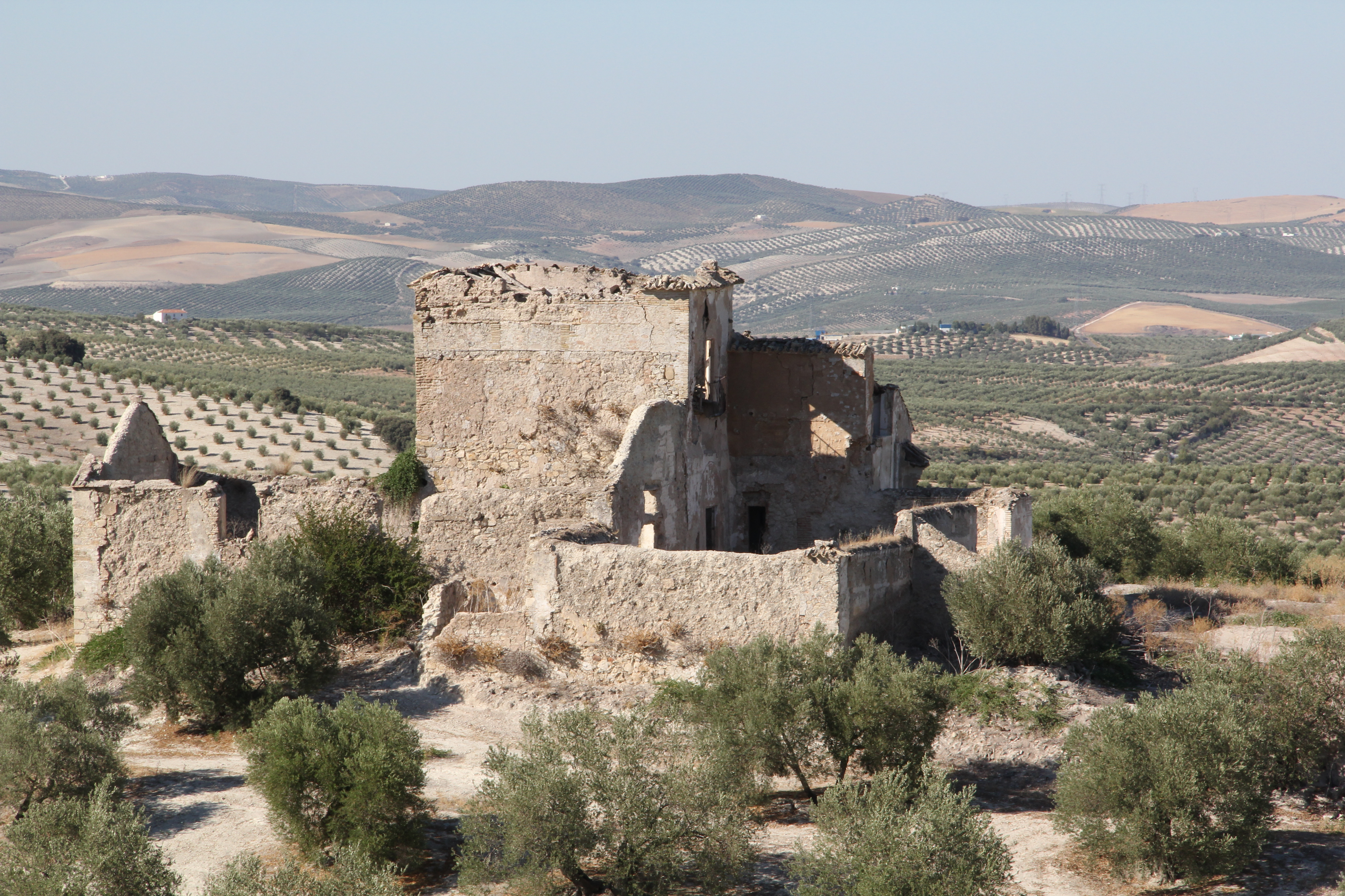 Imagen de la Ermita de la Virgen de Todos los Santos, situada en el término municipal de Nueva Carteya (Córdoba, España)